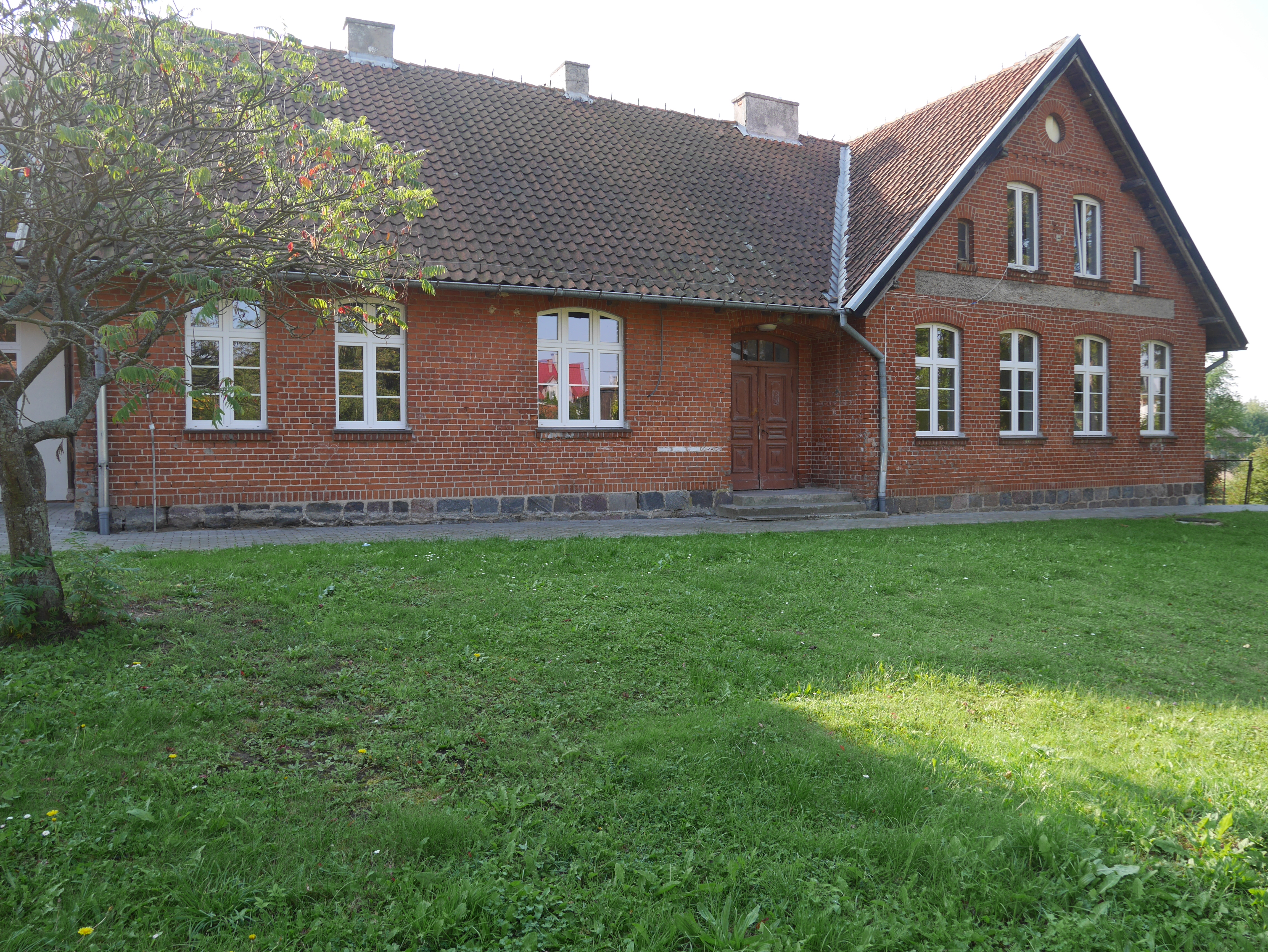 Boreczno, szkoła, tzw. czerwona, 1908